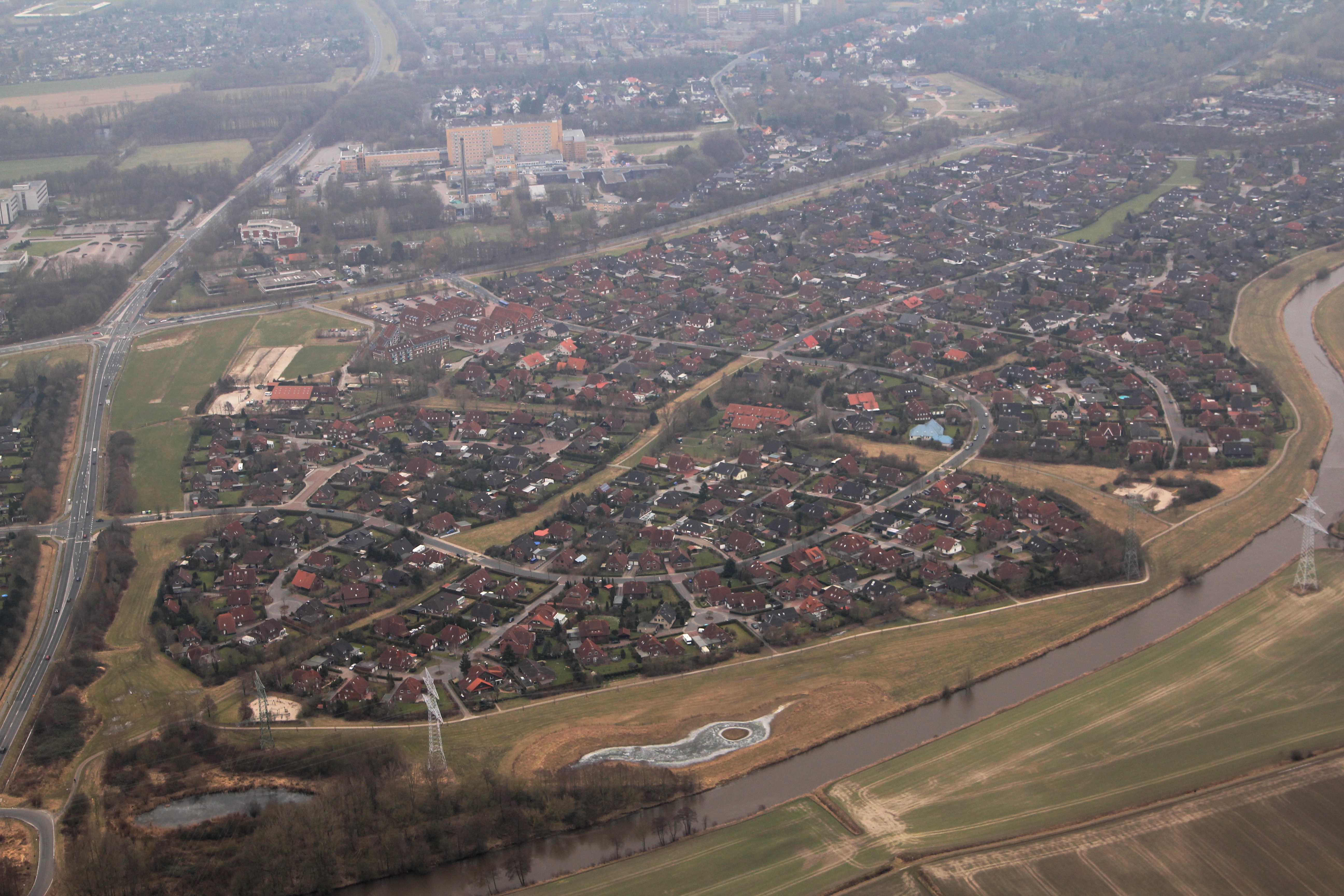 Ein Luftbild des Wilhelmshavener Stadtteils Maadebogen, von Nordnordwesten aus aufgenommen. Gut erkennbar ist im Vordergrund der namensgebende Bogen der Maade, der dortige öffentliche Grünbereich mit Wegen sowie den Hochspannungsleitungen, die Straßenschlaufe der Sven-Hedin-Straße und deren Verbindung durch die Beringallee zum Kolumbusring (hinten bzw. oben rechts), das Versorgungszentrum an der Kurt-Schumacher-Straße Ecke Sven-Hedin-Straße, die generelle Einfamilienhaus-Struktur des Stadtteils sowie die Nähe zum Reinhard-Nieter-Krankenhaus (gelber Klotz) im Hintergrund. Dieses Bild entstand während des Fotoflugkurses 2013.